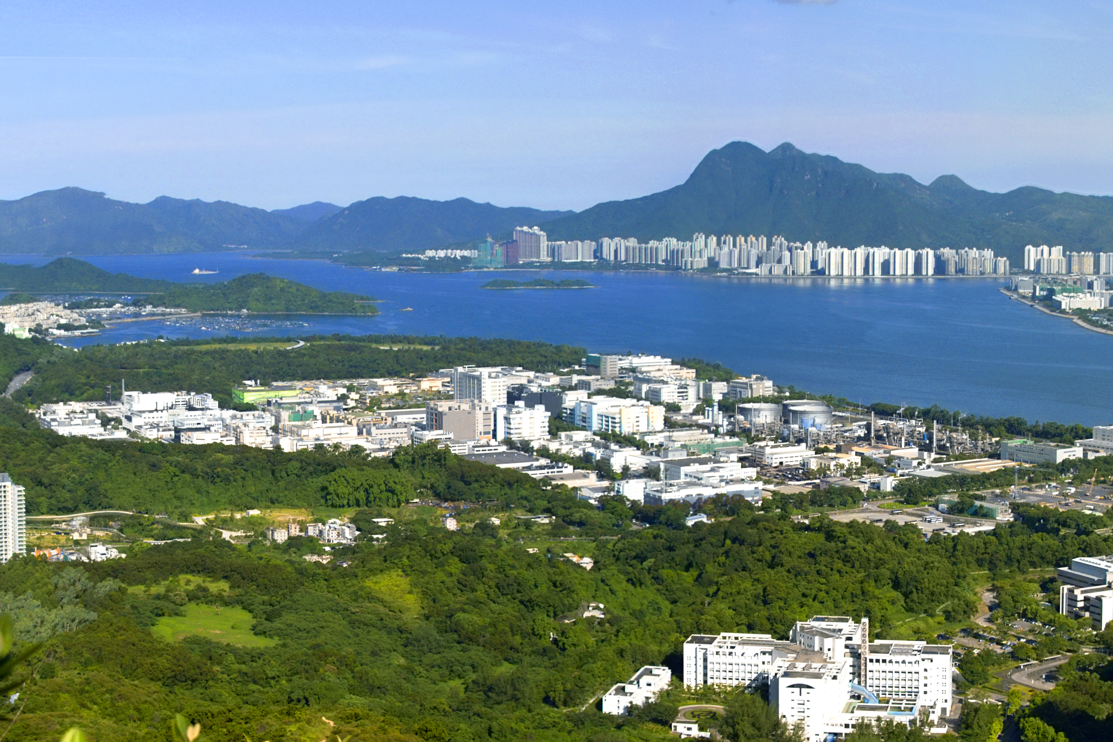 Tai Po Industrial_Estate